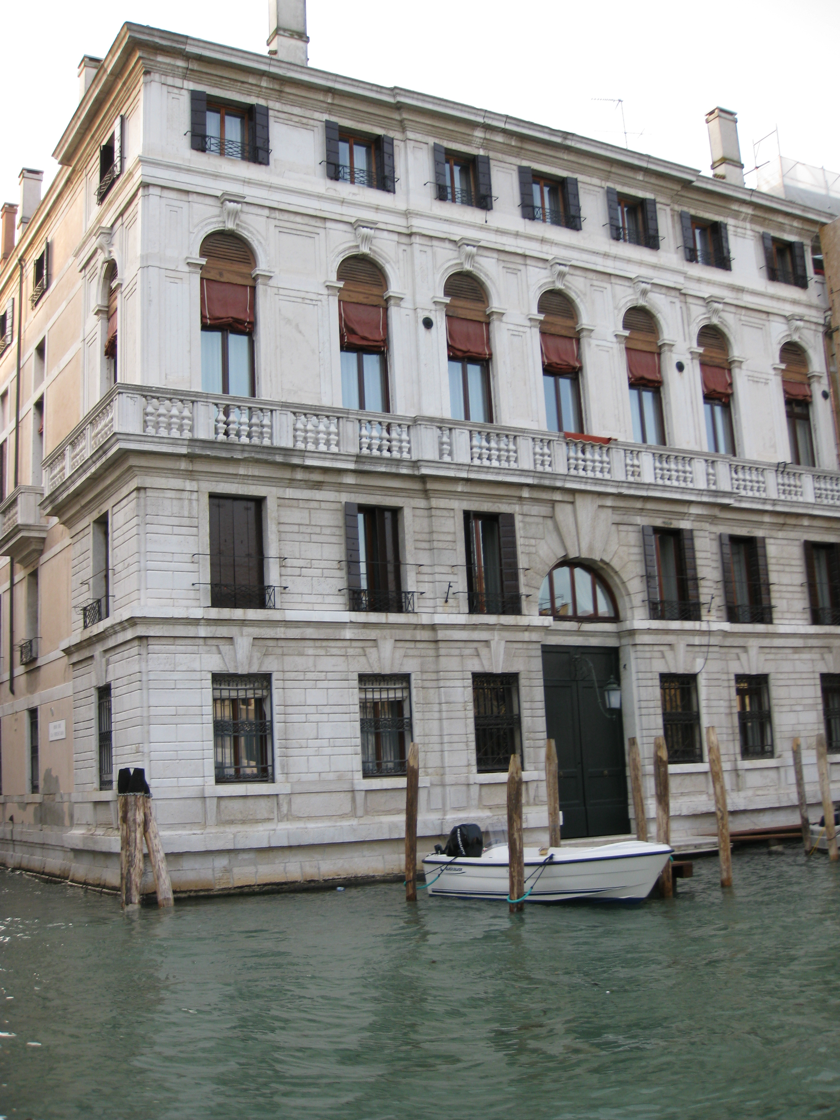 Palazzo Civran Grimani